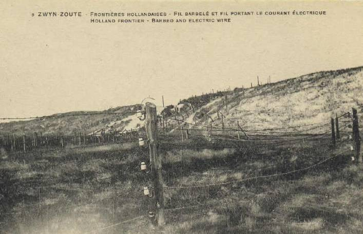 Das Grenzhochspannungshindernis an der belgisch-niederländischen Grenze 1915 - 1918